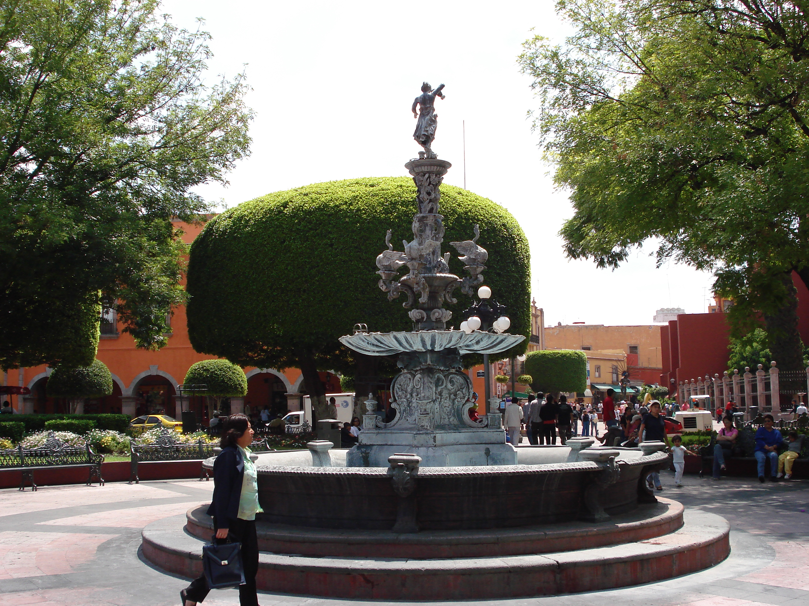 Jardin Zenea